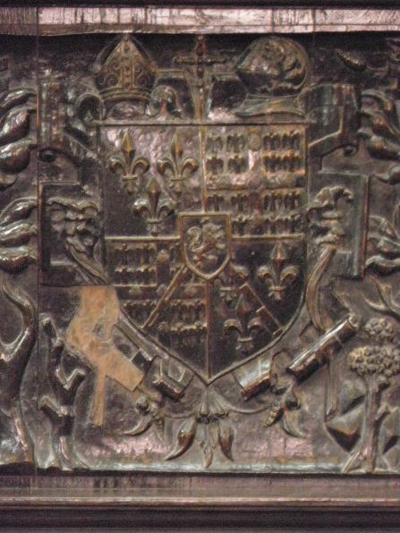 Armes de Mgr François de Laval (Cathèdre de la Cathédrale Saint-Samson de Dol (35))